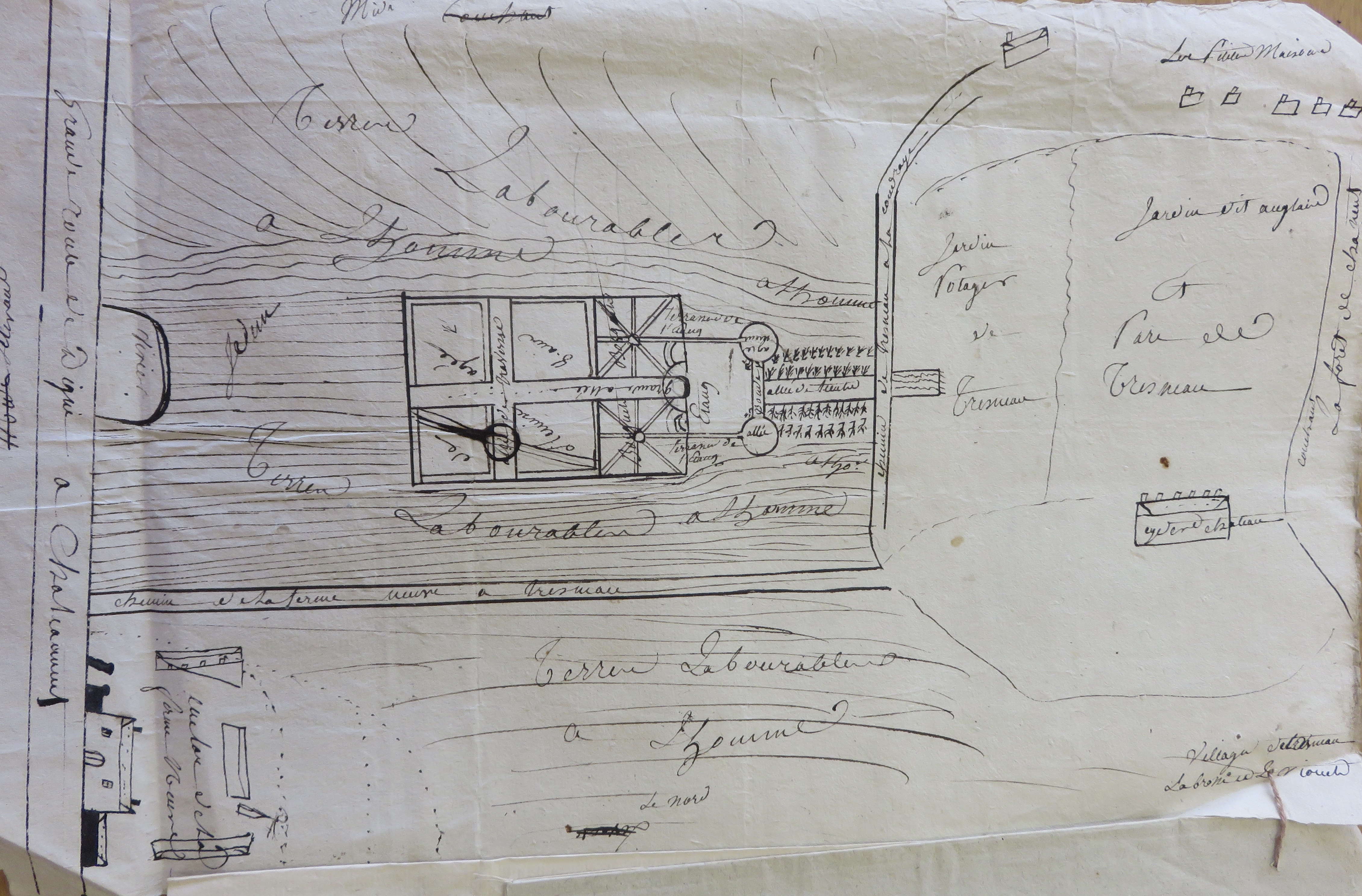 Plan du XVIII e représentant les terres de la seigneurie de Tresneau entre la ferme neuve et les petites maisons ( département d'Eure-et-Loir)